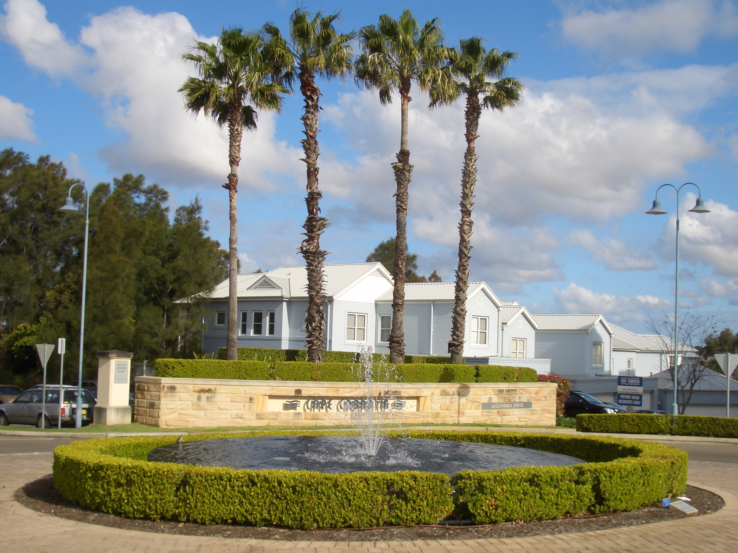 Cape Cabarita, Sydney